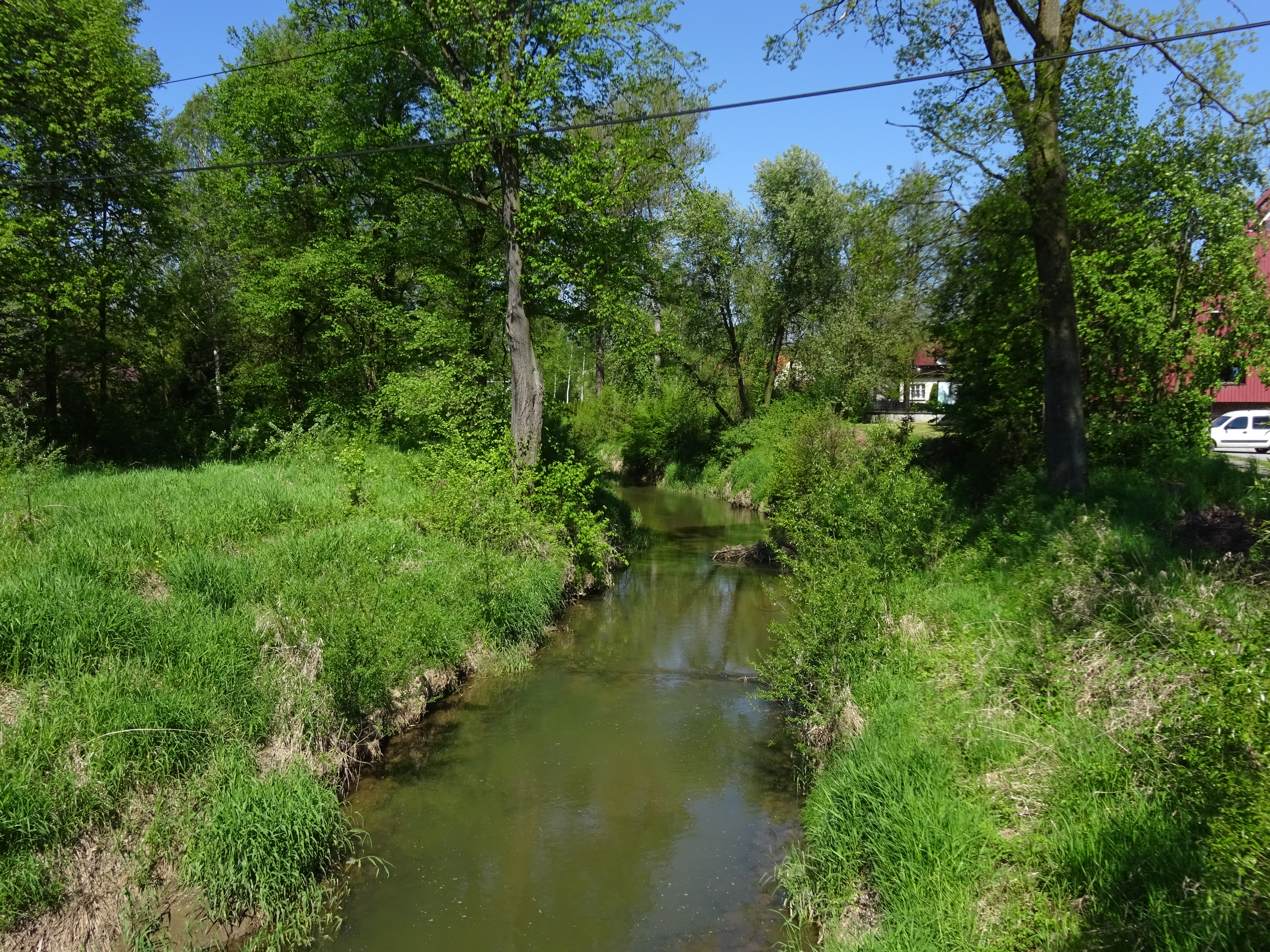 Rzeka Skawinka (Cedron) w Woli Radziszowskiej.